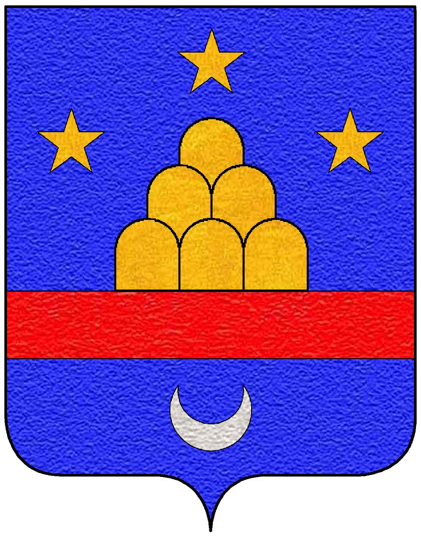 Stemma della famiglia Gessi